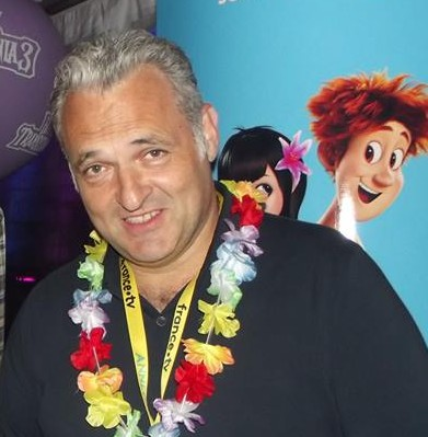 Genndy Tartakovsky au festival international du film d'animation d'Annecy 2018.